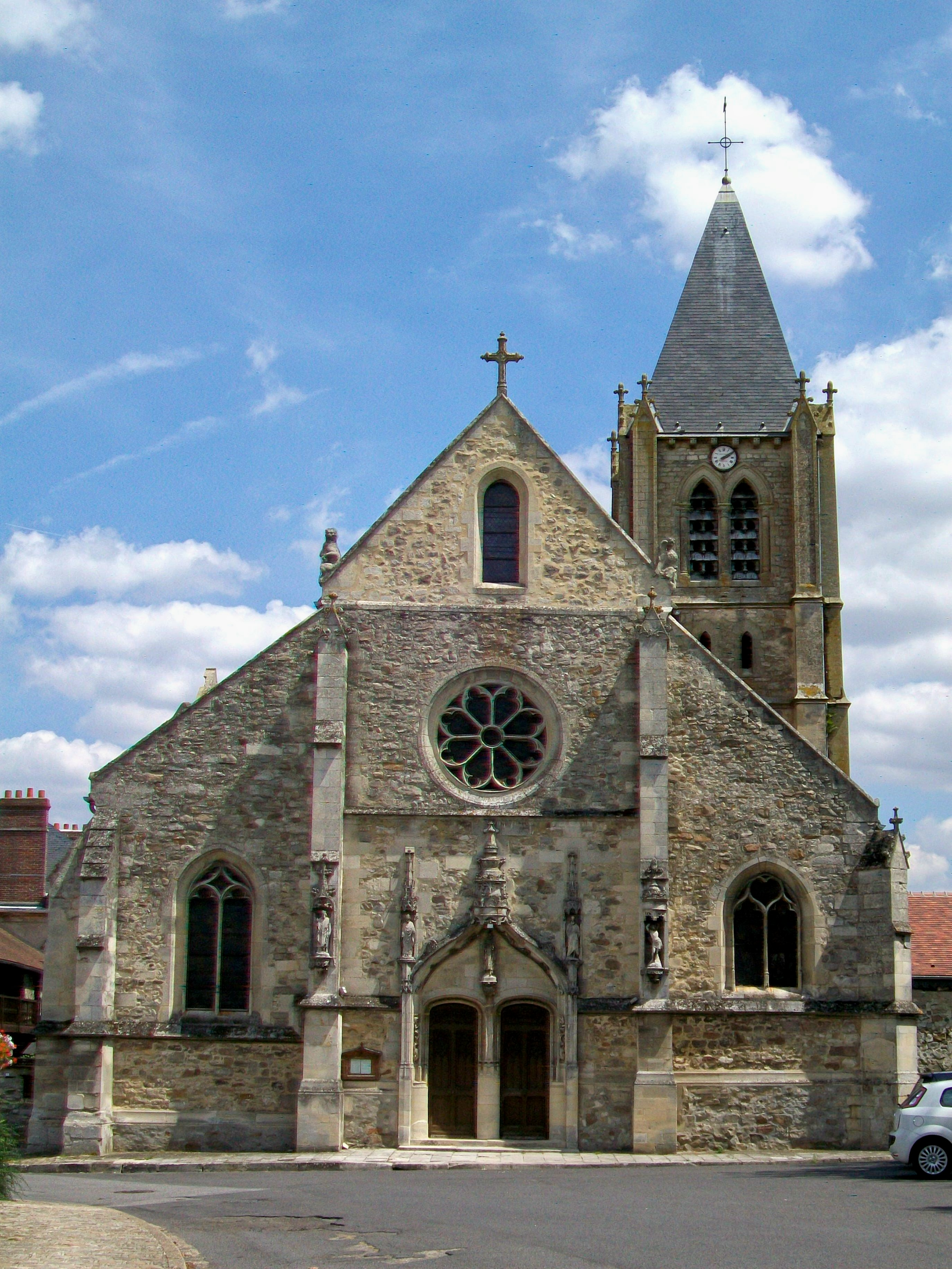 La façade ouest de l'église Saint-Martin, dans son aspect qu'elle a pris lors des restaurations des années 1880.